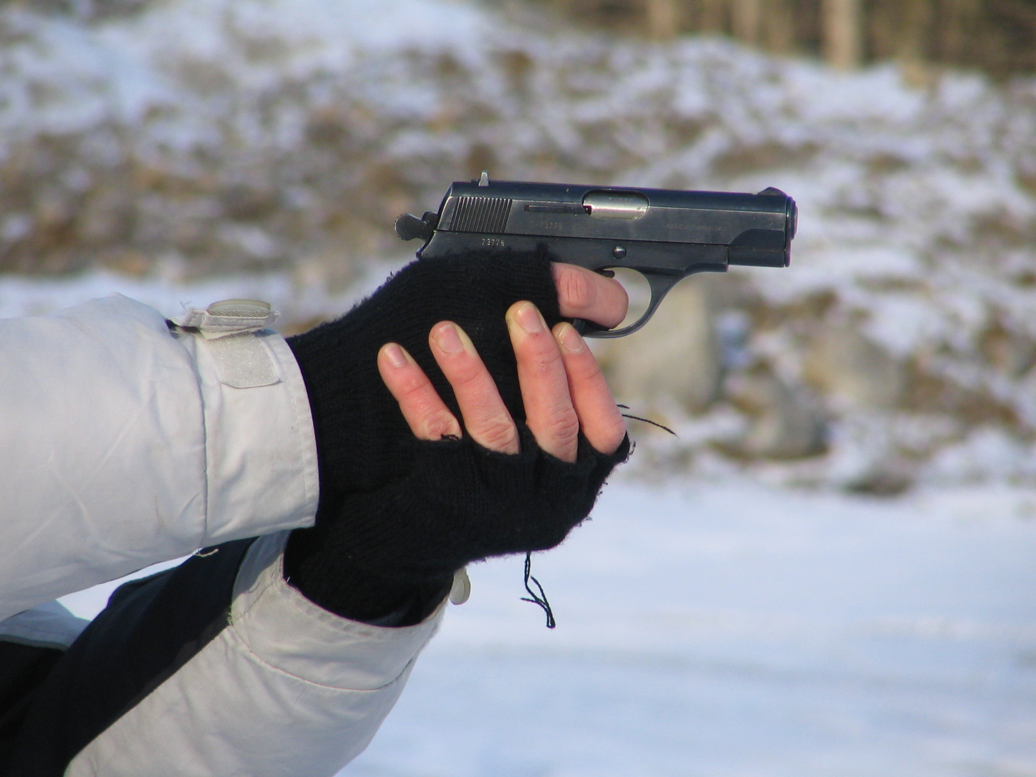 Jugoslav Zastava M70 semi-automatic pistol cal. 7,65 mm